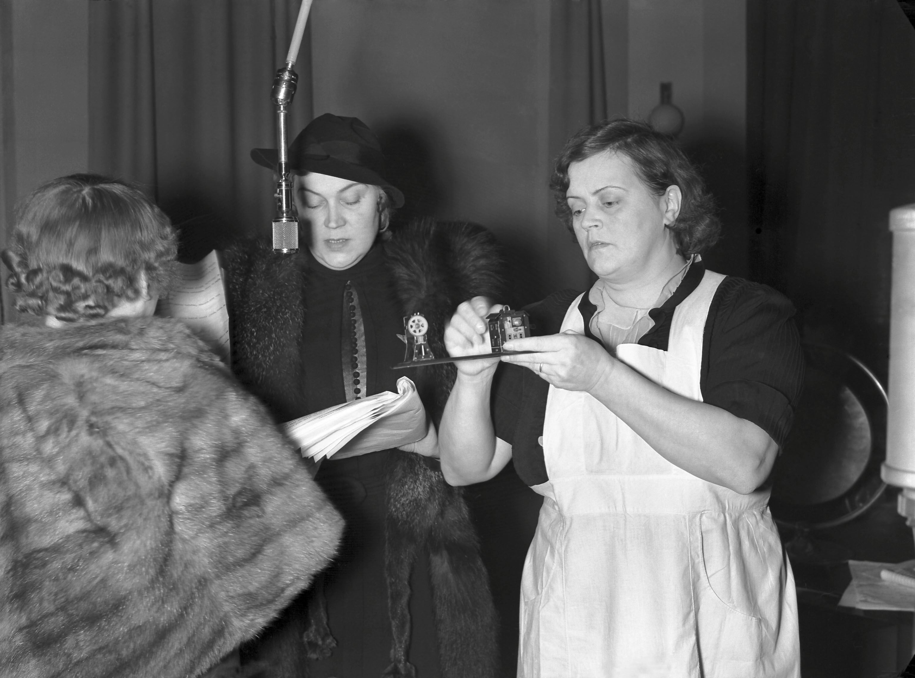 Radiokuunnelman tekeminen. Näyttelijöitä radion studiossa. Tunnistamaton nainen selin, Elsa Rantalainen mikrofonin ääressä ja näyttelijä Eine Laine. Tiedätkö jotain tästä kuvasta? Jätä kommentti tai ota yhteyttä sähköpostitse: Tutustu Ylen arkistosisältöihin: Fler skatter från Yles arkiv: More about Yle, the Finnish Broadcasting Company